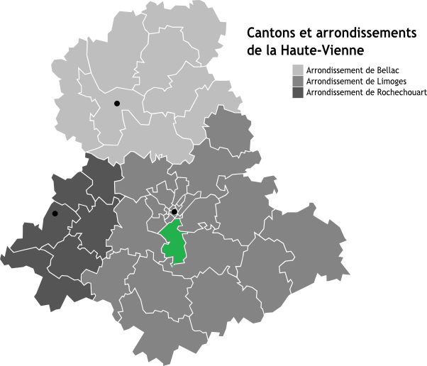 Canton de Limoges-Condat, Limousin, France en Carte des arrondissements de la Haute-Vienne